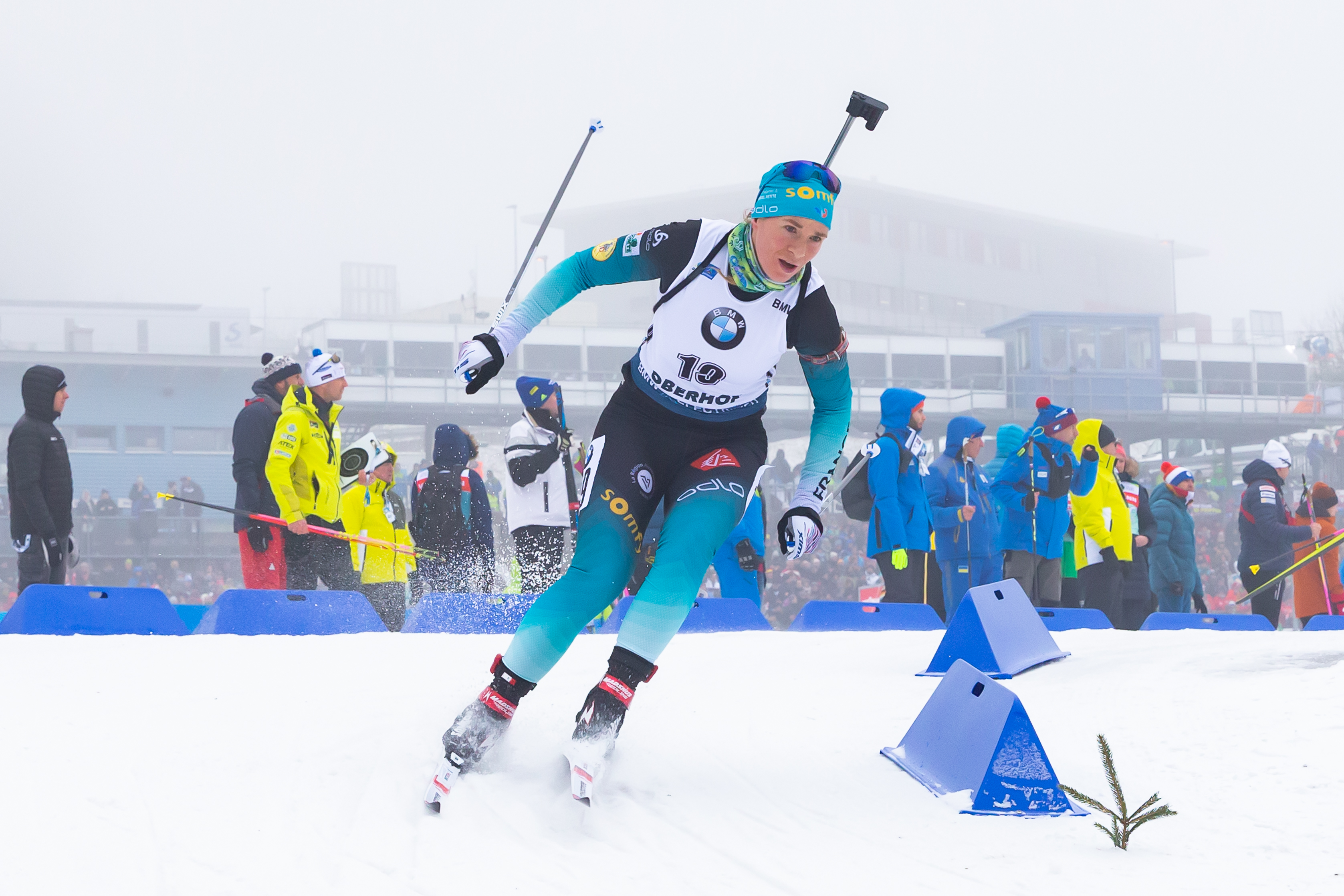 IBU World Cup Biathlon Oberhof; Anais Bescond (FRA, Frankreich)